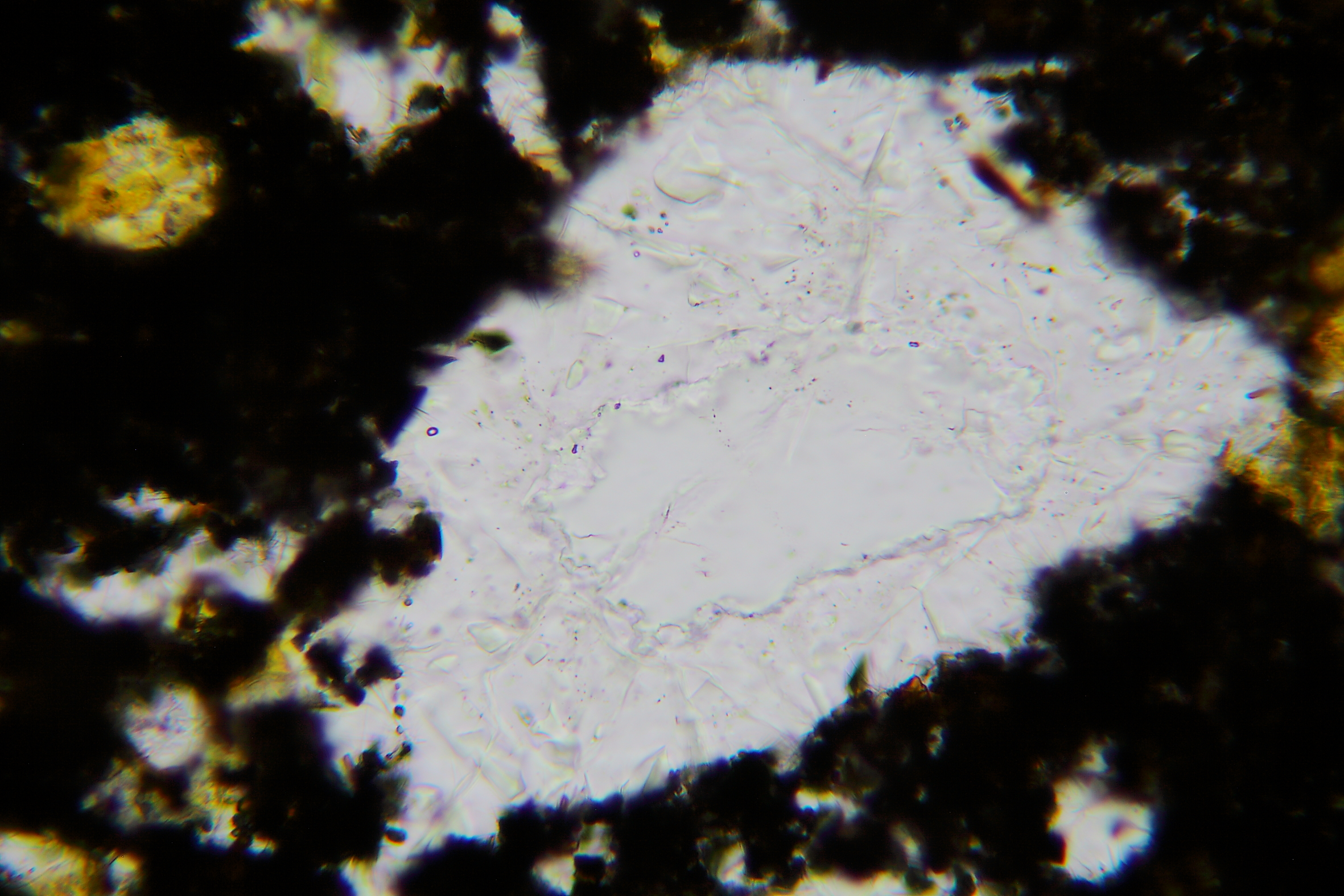 Umwandlung von Quarz inTridymit in einen Quarzkorn in gefrittetem Gestein (Dünnschliff, LPL)